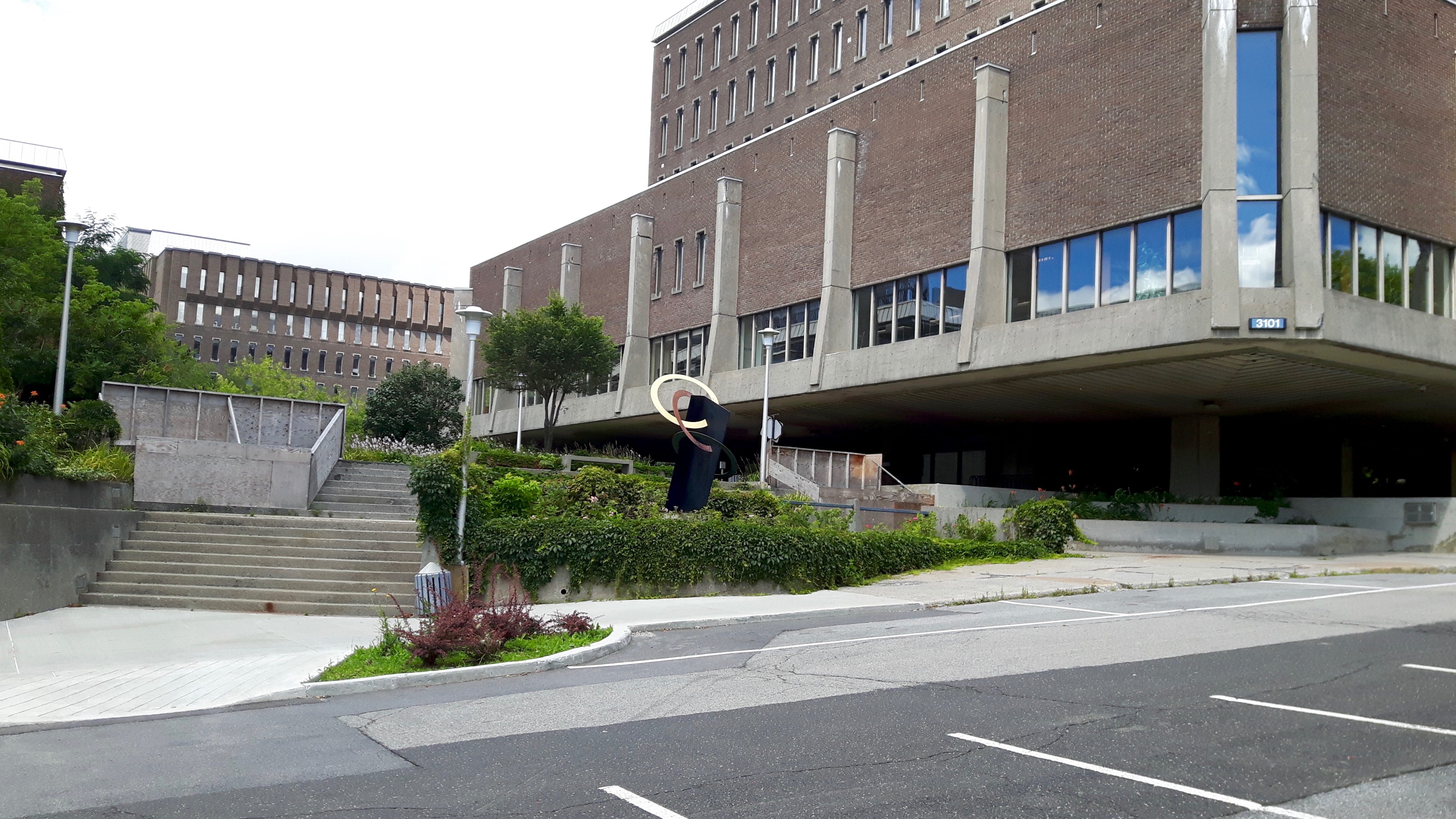 Pavillon Maximilien-Caron, Université de Montréal.